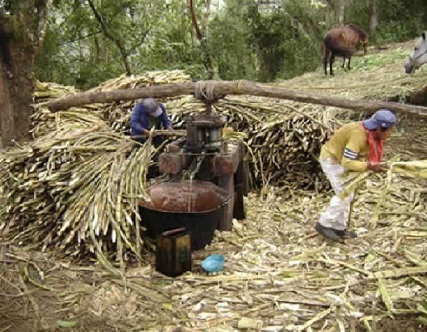 EMPLEOS DE CALNALI 2010 MOLIENDA_DE_CAÑA.JPG